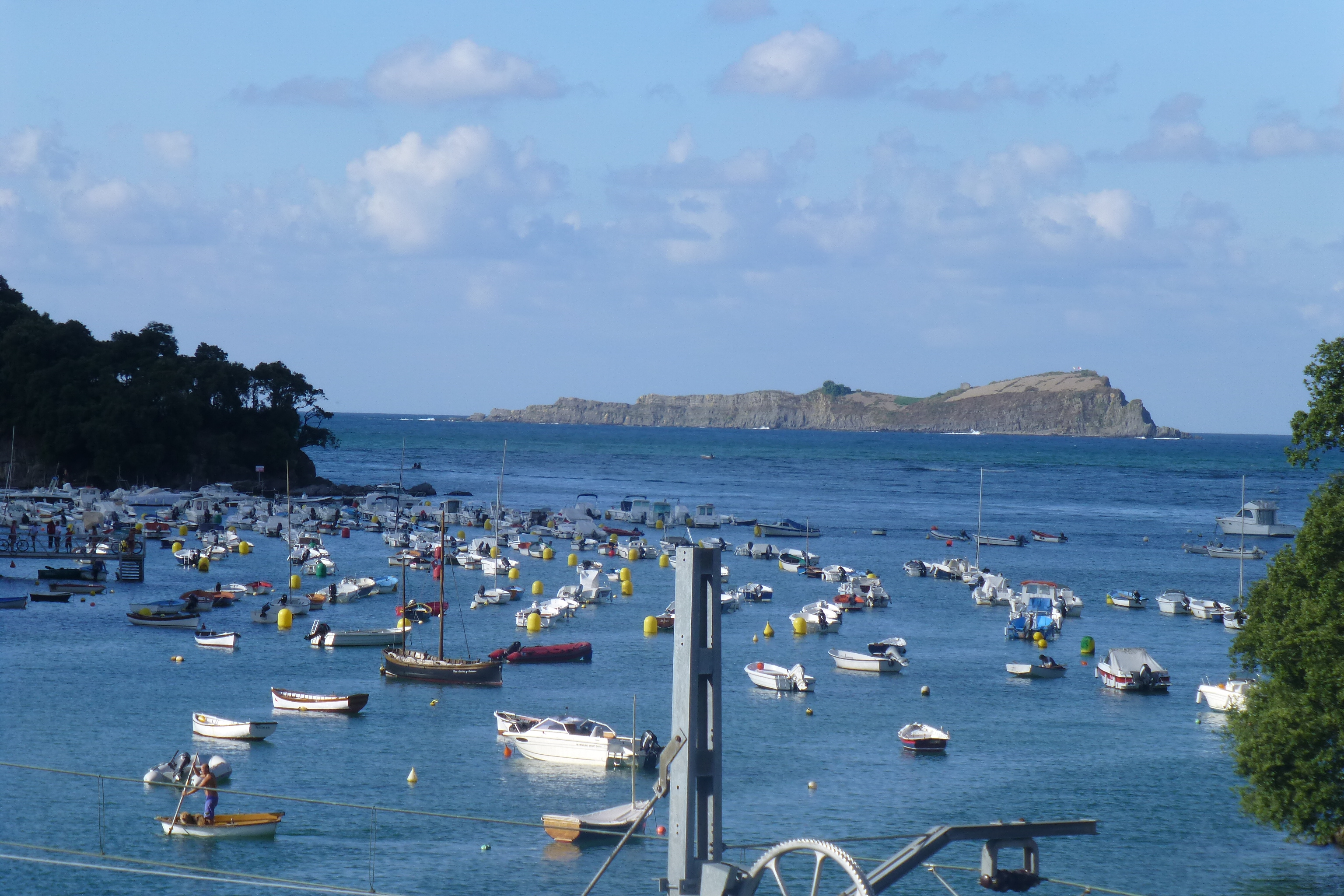 Izaro es una isla de España en aguas del mar Cantábrico, situada en la costa de la provincia de Vizcaya, frente a las localidades de Bermeo y Mundaka a una distancia de 3 km de la primera y 2,2 km de la segunda. Sin embargo, el territorio pertenece a la villa de Bermeo. La isla ocupa el centro de la desembocadura de la ría de Mundaka, y se encuentra flanqueada por los cabos de Ogoño y Matxitxako. Está comprendida en el área natural Urdaibai.